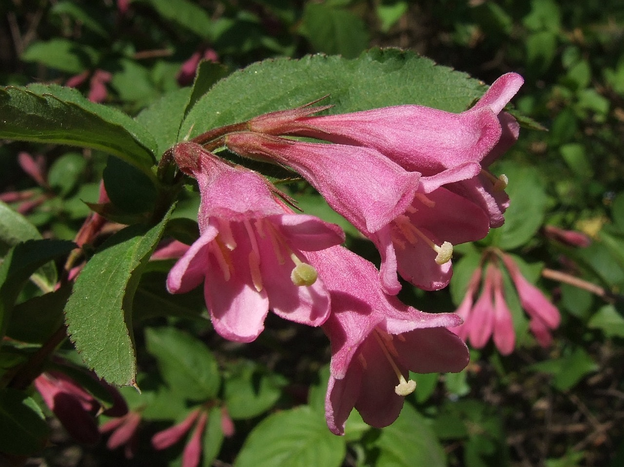 Weigela florida